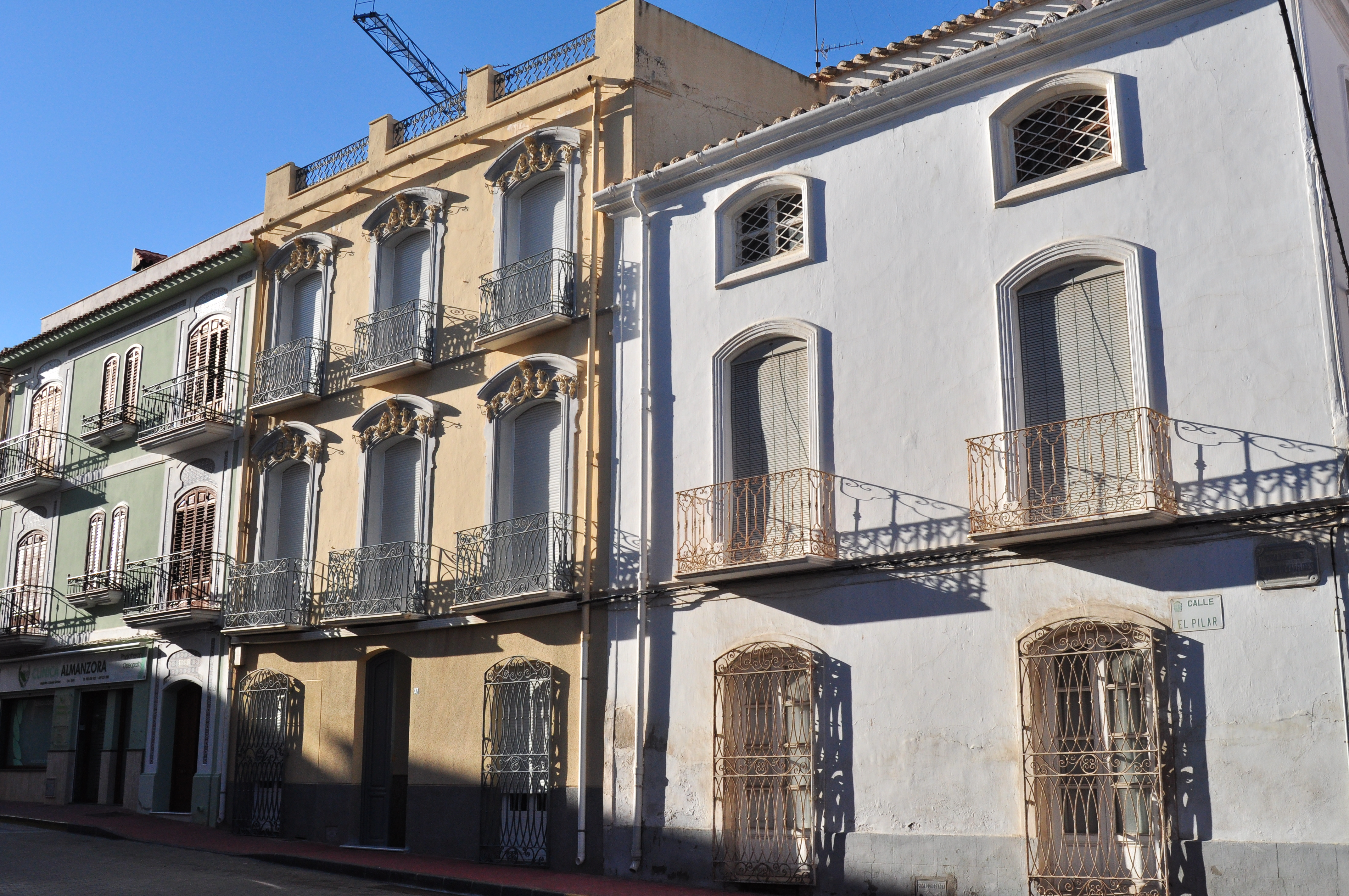 Cuevas de Almanzora - 013 Cuevas del Almanzora, Spain.